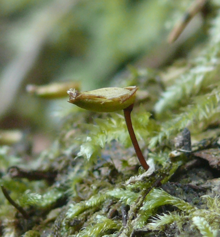 Buxbaumia viridis, Schwäbisch-Fränkische Waldberge